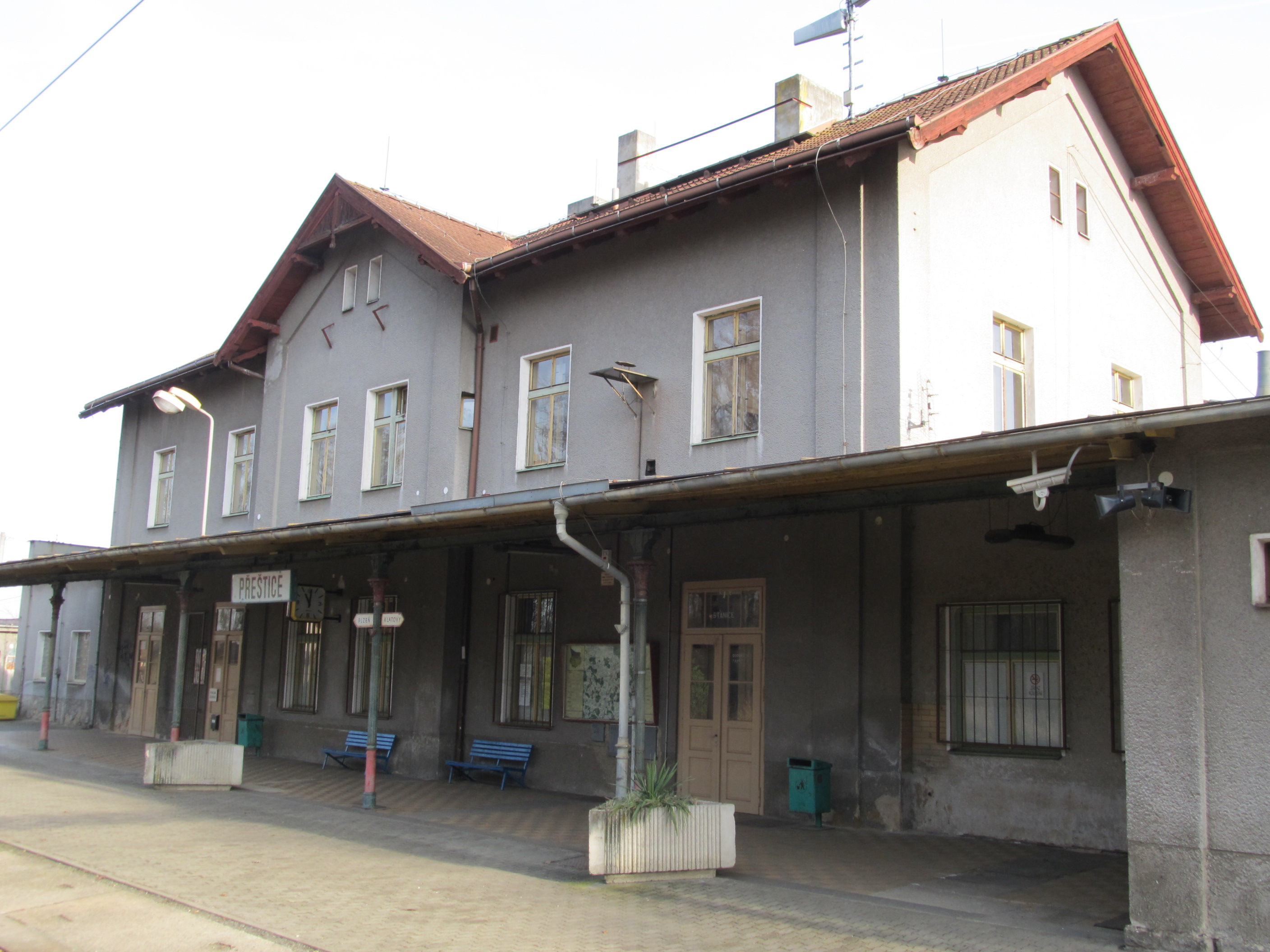 Přeštice - železniční stanice